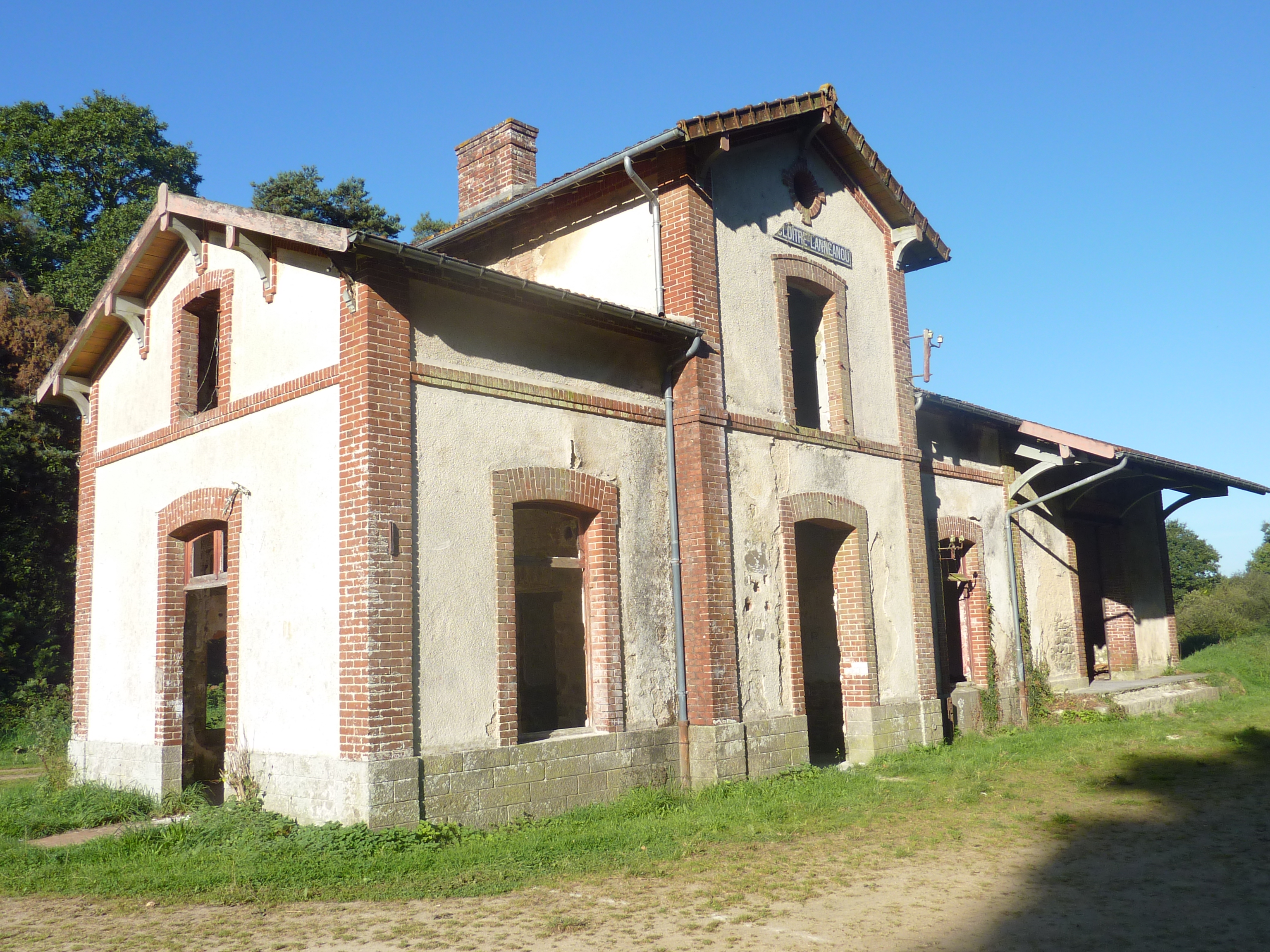 Plougonven : l'ancienne gare de Kermeur en Plougonven ( dite "Cloître-Lannéanou") désormais en ruine (photo prise en 2011)